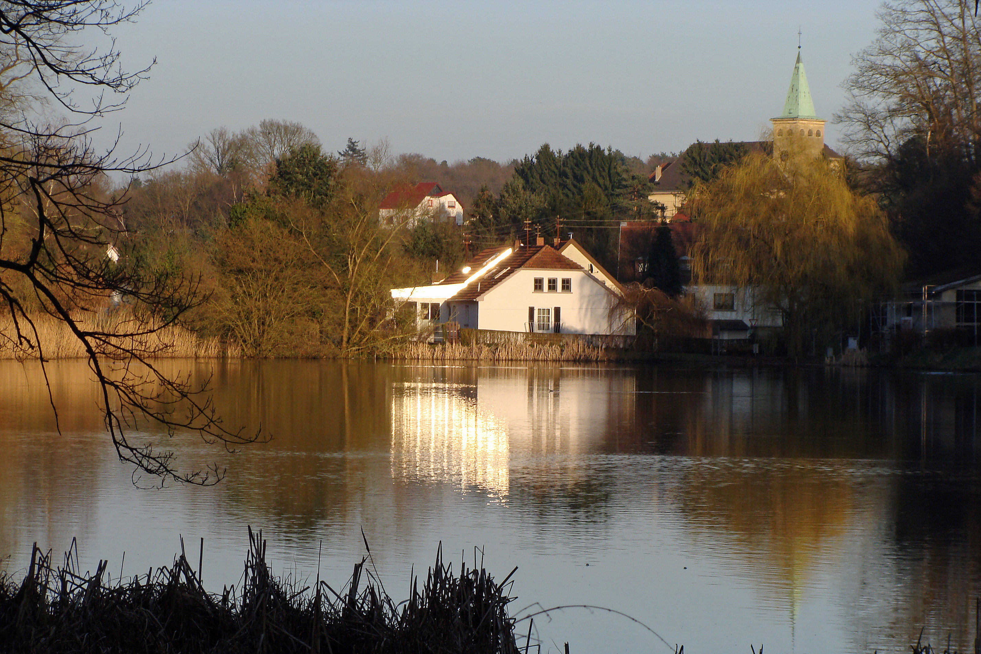 St. Nikolaus est une bourgade allemande située en Sarre faisant partie de la commune de Großrosseln. Photographie prise le 10 mars 2014.